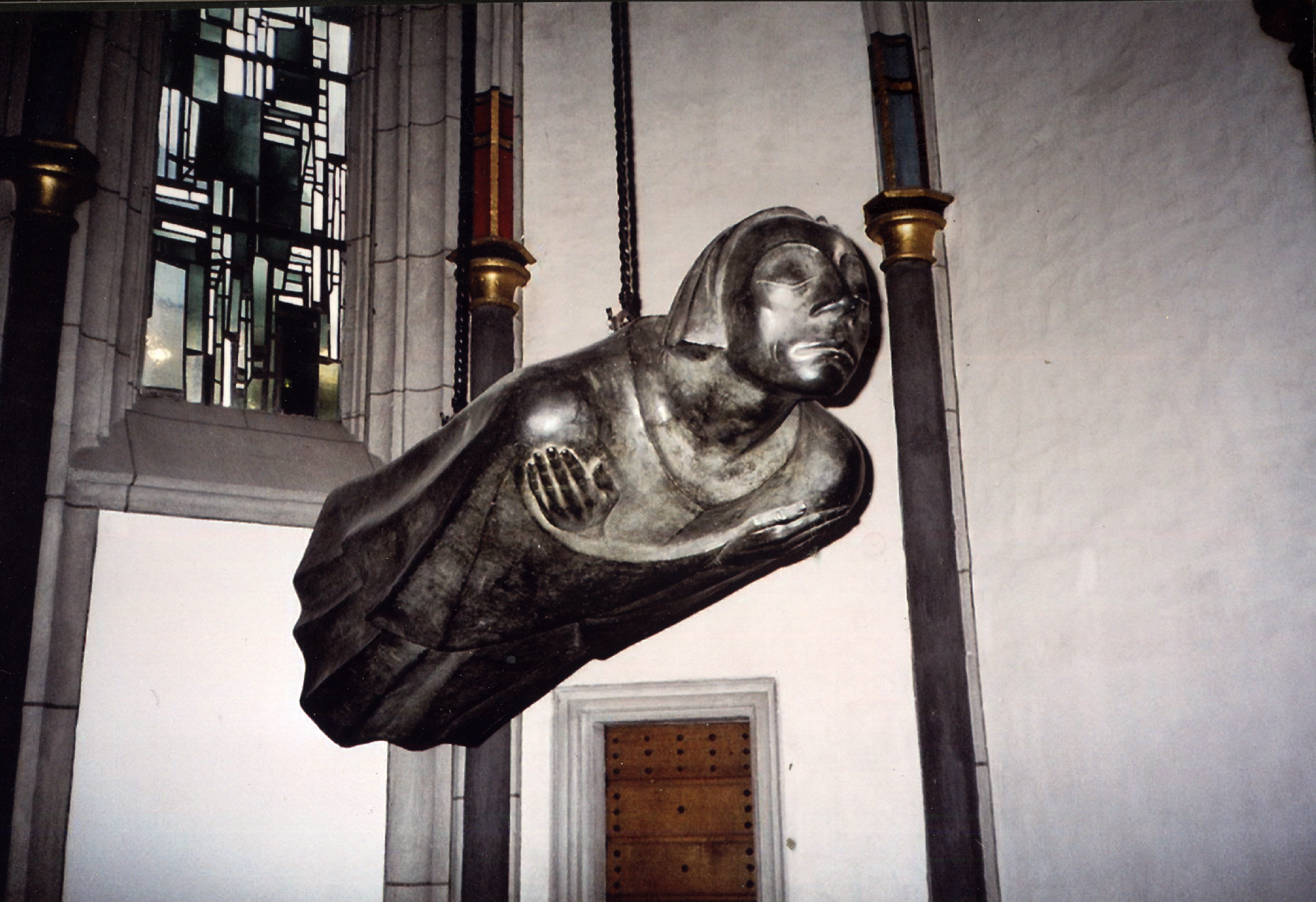 Барлах.Парящий ангел.Кёльн.Антонитенкирхе.